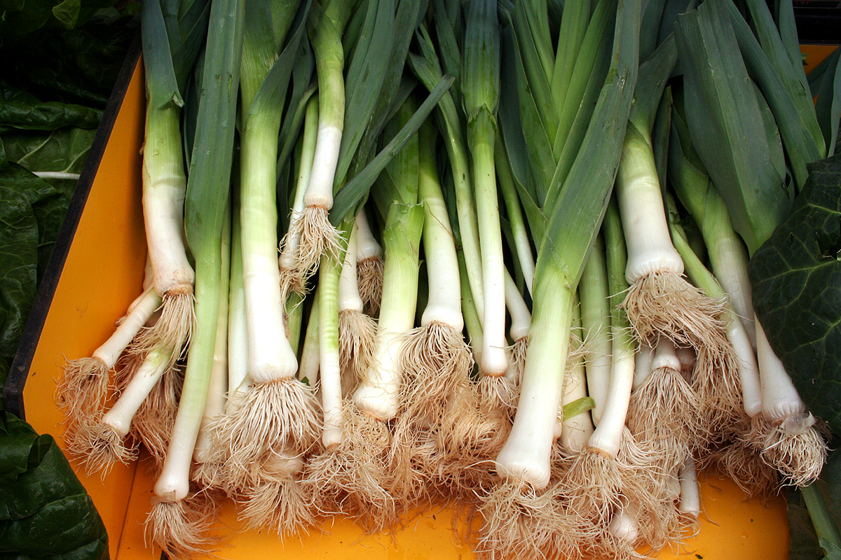 Leek / Poireau